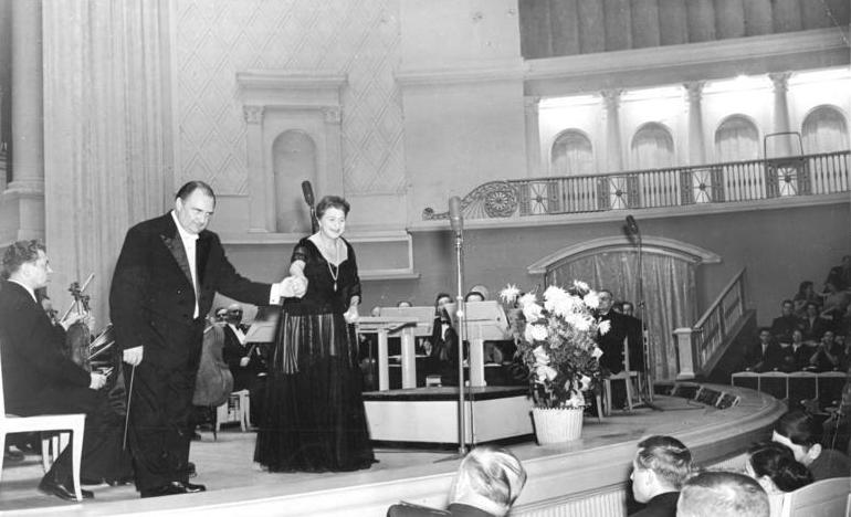 Zentralbild-Tass-XIII Pu-Qu 12.12.1955 Dezember 1955 Konwitschny und Klose gastieren in der Sowjetunion Generalmusikdirektor Nationalpreisträger Professor Franz Konwitschny von der Deutschen Staatsoper Berlin und Kammersängerin Margarete Klose von der Deutschen Staatsoper Berlin weilen zur Zeit zu einem Gastspiel in der Sowjetunion. Das erste Sinfoniekonzert fand im P.-I.-Tschaikowski-Konzertsaal in Moskau statt, in dem Professor Konwitschny das Sinfonieorchester des Allunionsrundfunks dirigierte. An dem Konzert wirkte Kammersängerin Margarete Klose mit, die mehrere Arien vortrug. UBz. Franz Konwitschny und Margarete Klose danken für den Beifall des Moskauer Publikums.